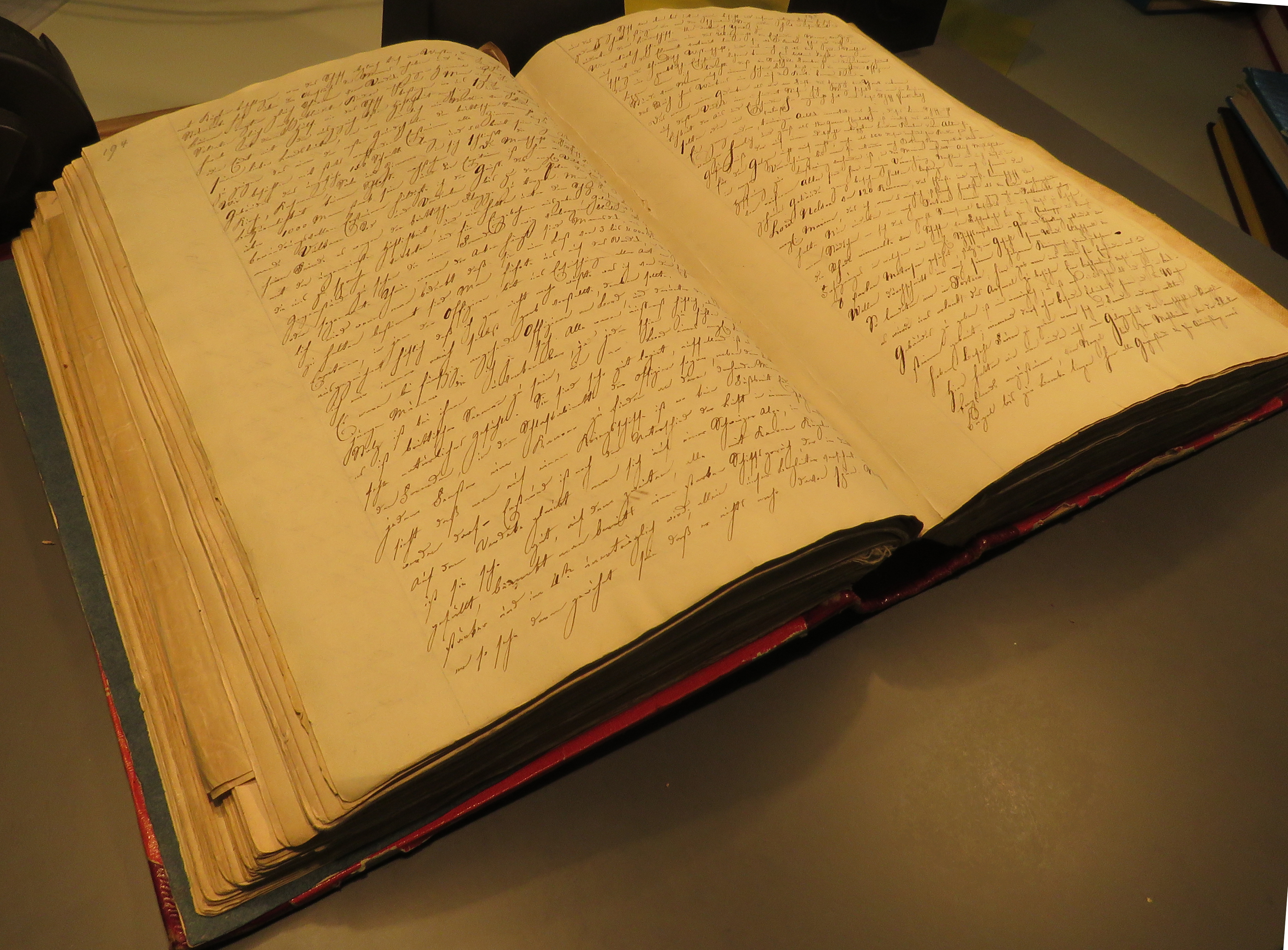 Manuskript des Tag und Familienbuchs des Franz (Simon) Meyer (1799-1871)